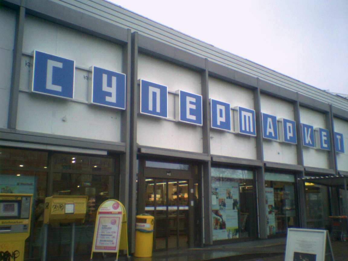 Die Kaufhalle am Platz der Vereinten Nationen. Ladenschild mit kyrillischer Schrift für den Filmdreh zu Das Bourne Ultimatum